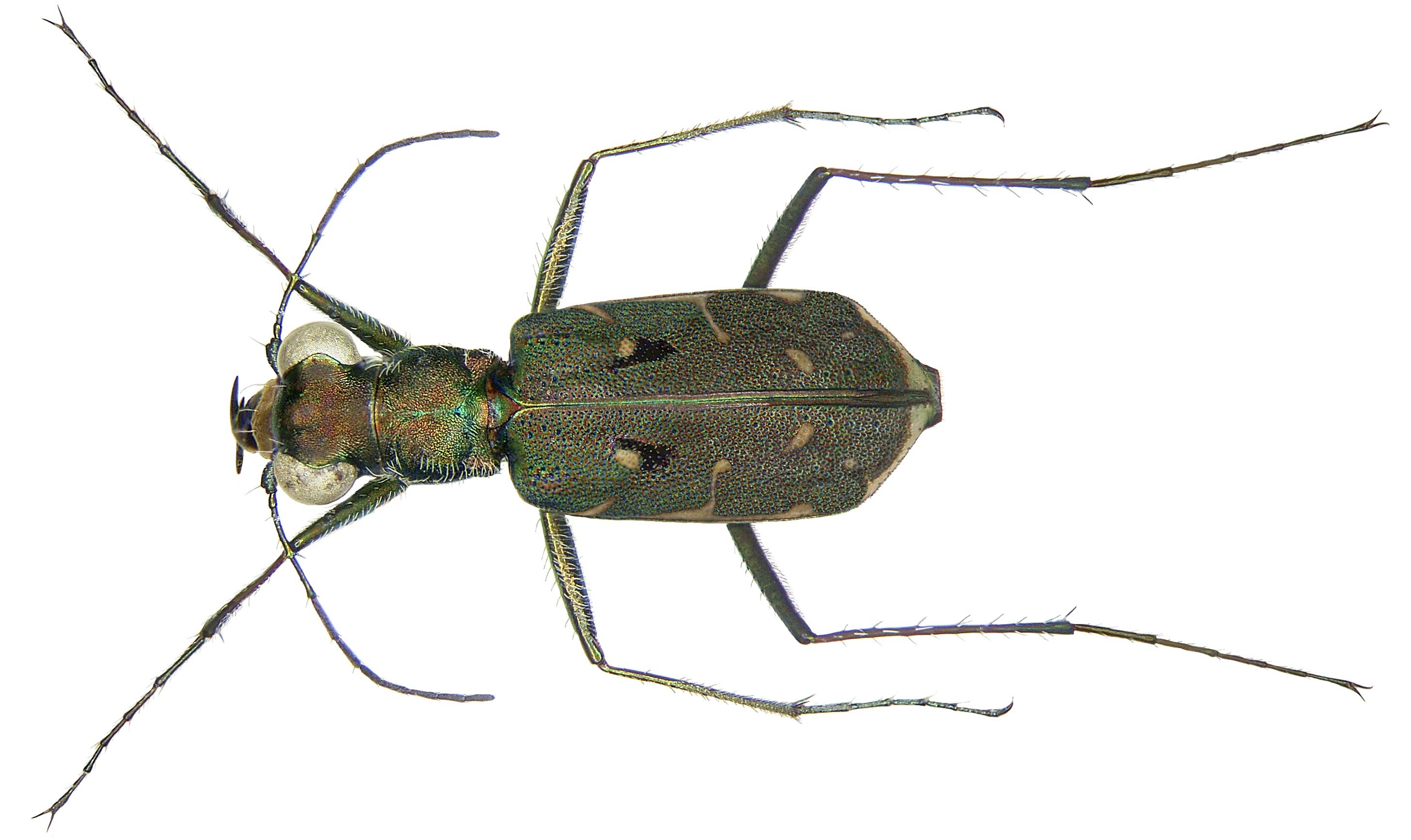 Familie: Carabidae Grösse: 11 mm Fundort: Senegal, M`Bour leg. U.Schmidt, 1992; det. J.Gebert, 2007 Foto: U.Schmidt, 2008